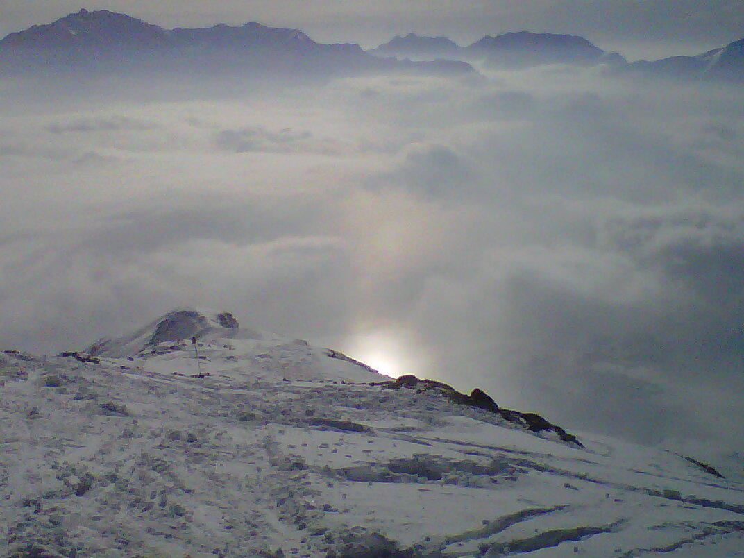 subsun éloigné par un obstacle